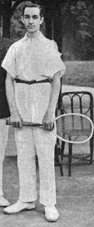 Max Decugis en 1902 (20 ans).